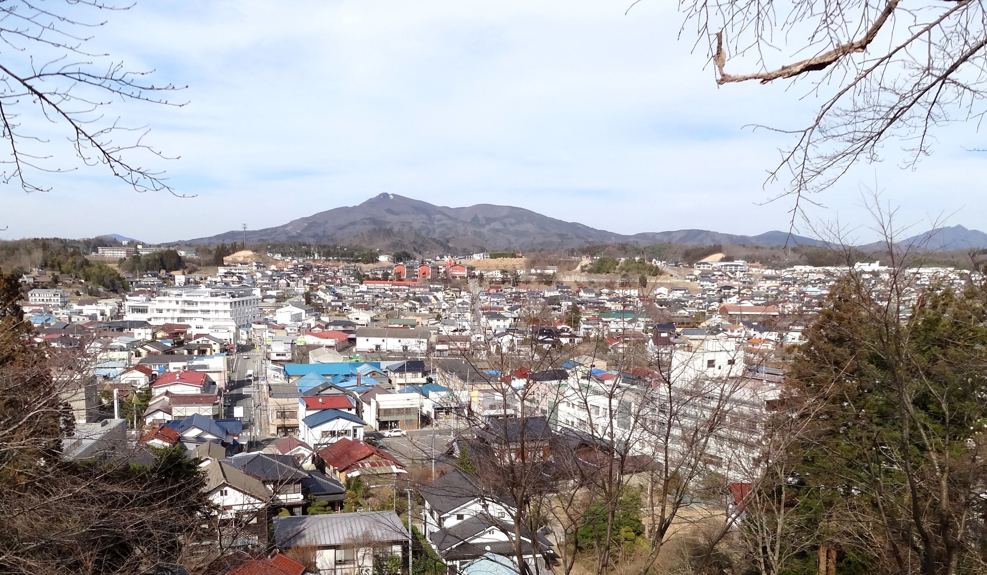 秋葉神社（船引町船引舘）より 船引市街（田村市中心部）の眺望